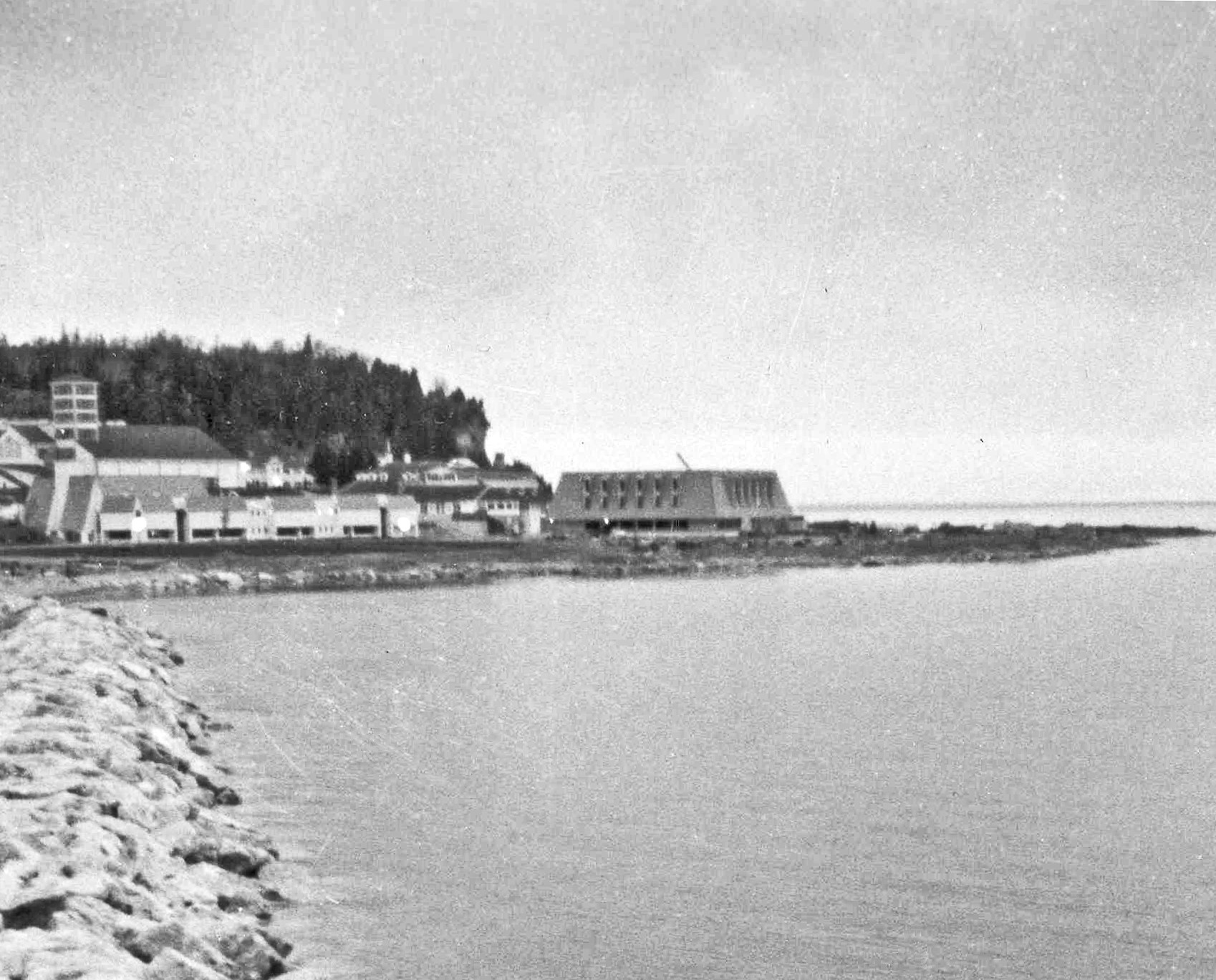 Bâtiments du centre de rencontre du réarmement moral de Mission Point, à Mackinac Island, en 1969.